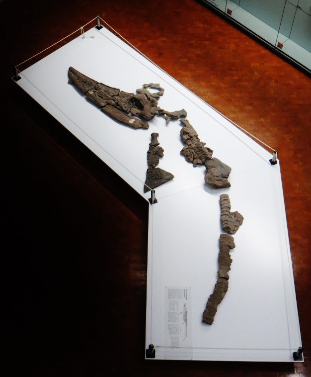 Fossil of Suevoleviathan- Took the picture at Museum am Lowentor, Stuttgart